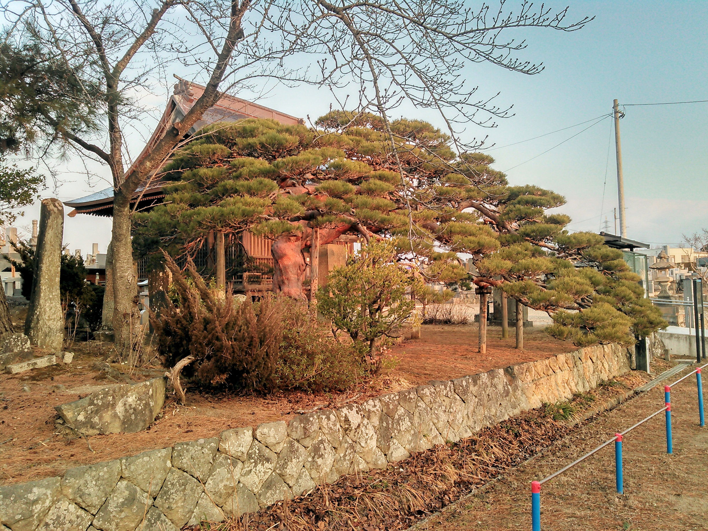 郡山市日和田町西方寺の傘マツ